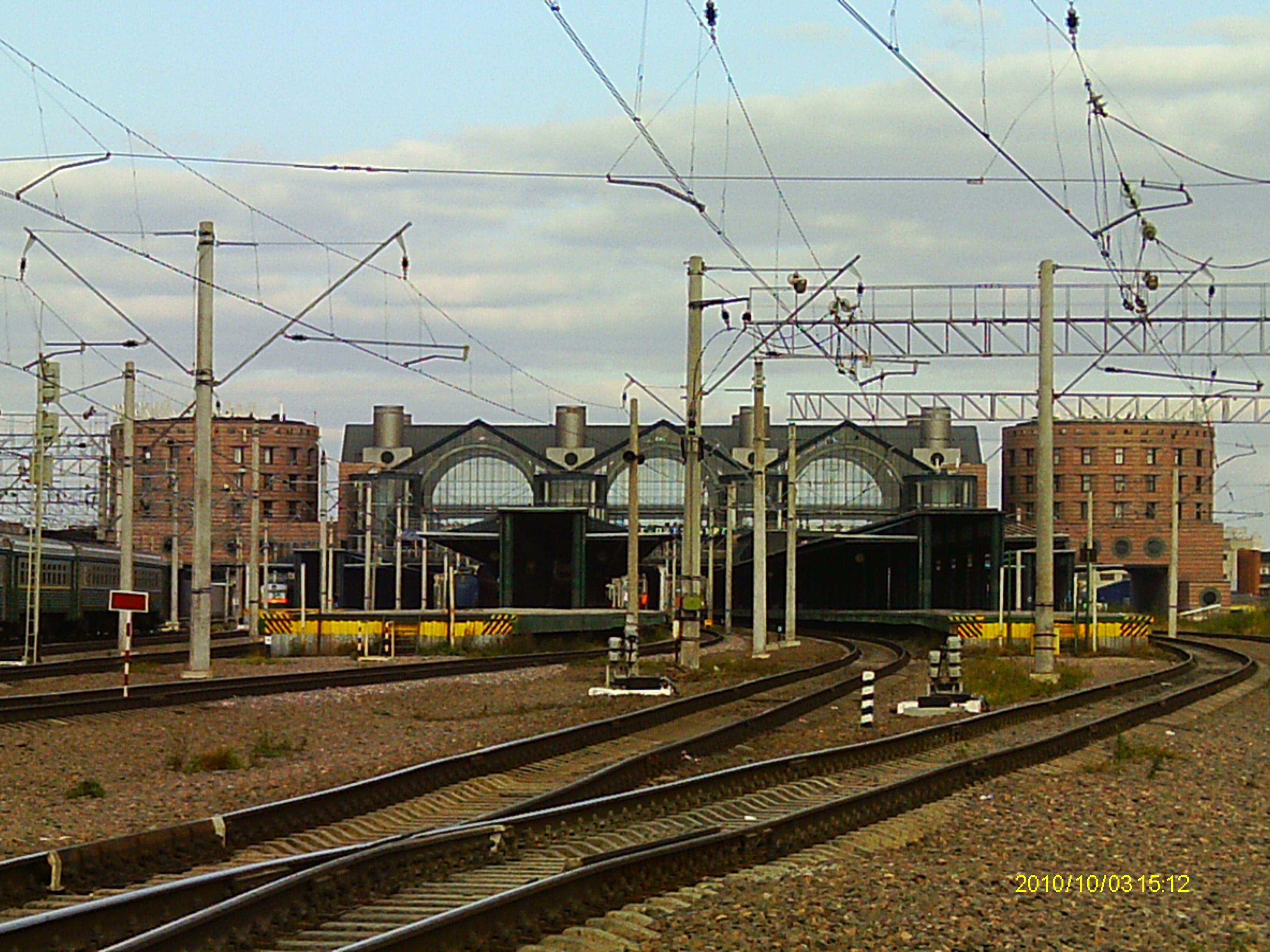 Вид на Ладожский вокзал с запада